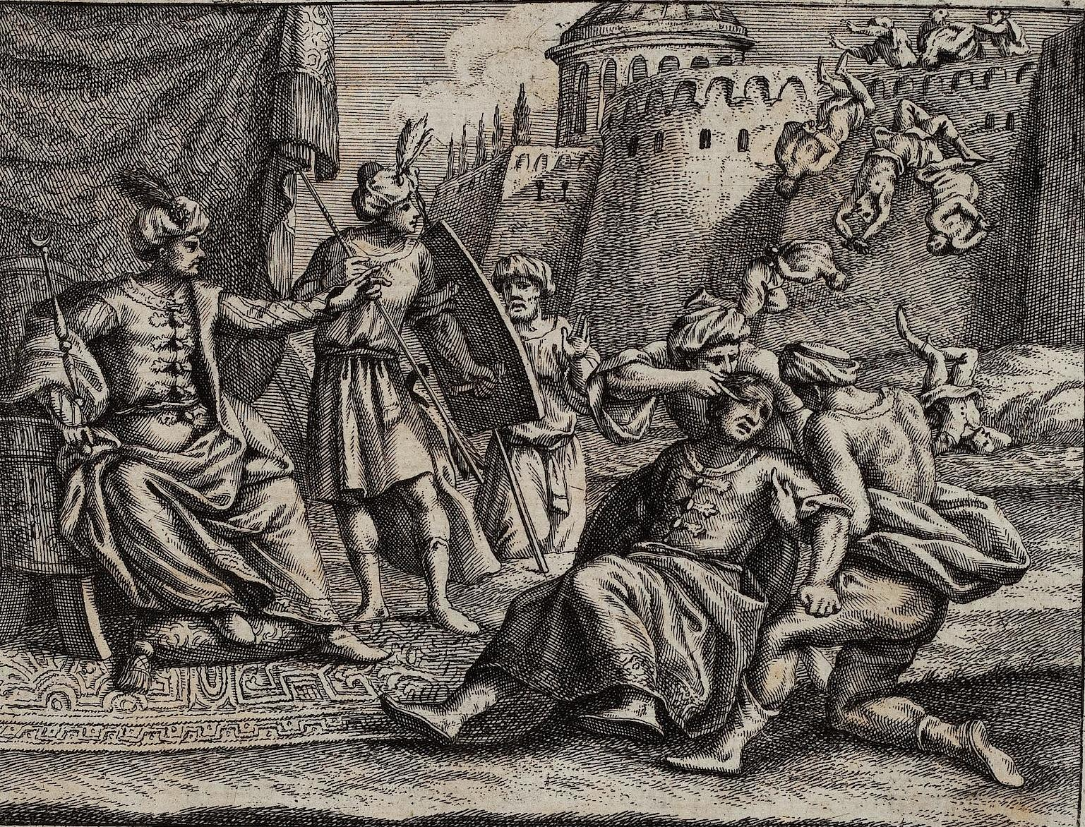 Гравюра из немецкого издания "Истории" Рико. Ослепление сына Мурада 1, Савджи.